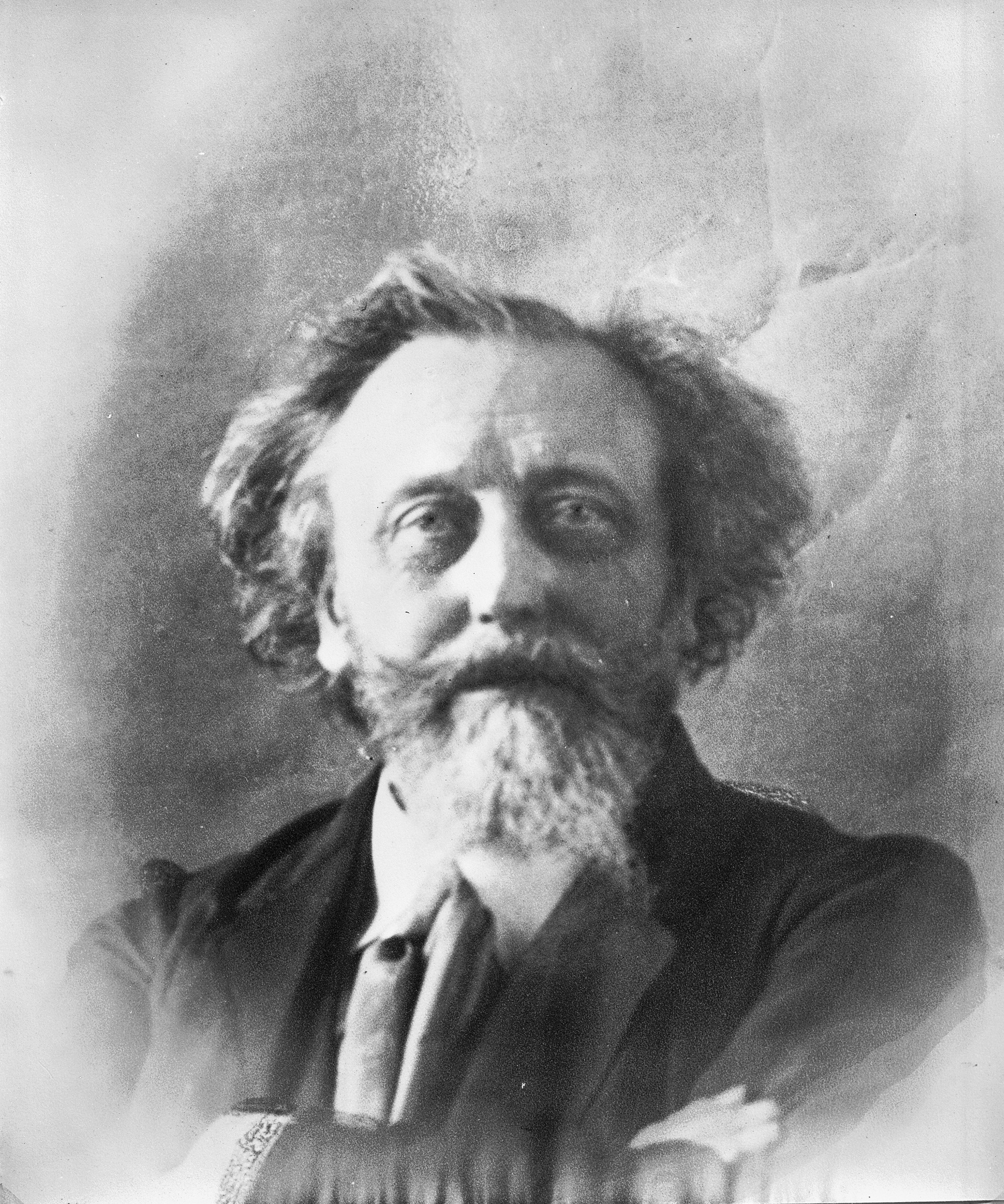 Portret: Portret (opmerking: Reproductie uit: A.C. Bleys, Vijf en twintig jaren bouwmeester 1864-1889)